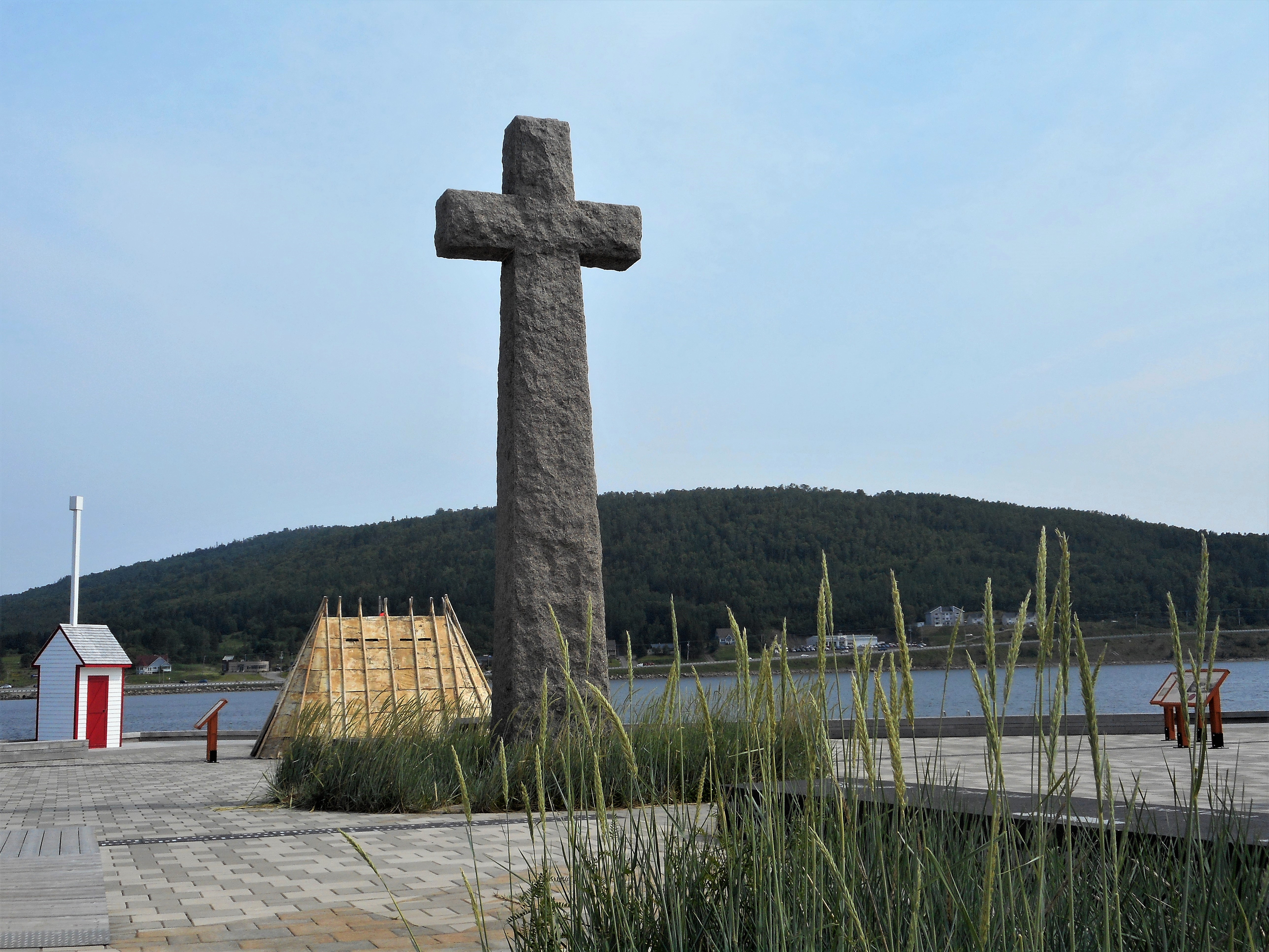 Monument en hommage à Jacques Cartier, Gaspé